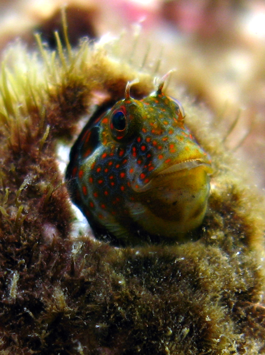 Photo of Hypsoblennius invemar in Santa Marta Bay, Colombia.